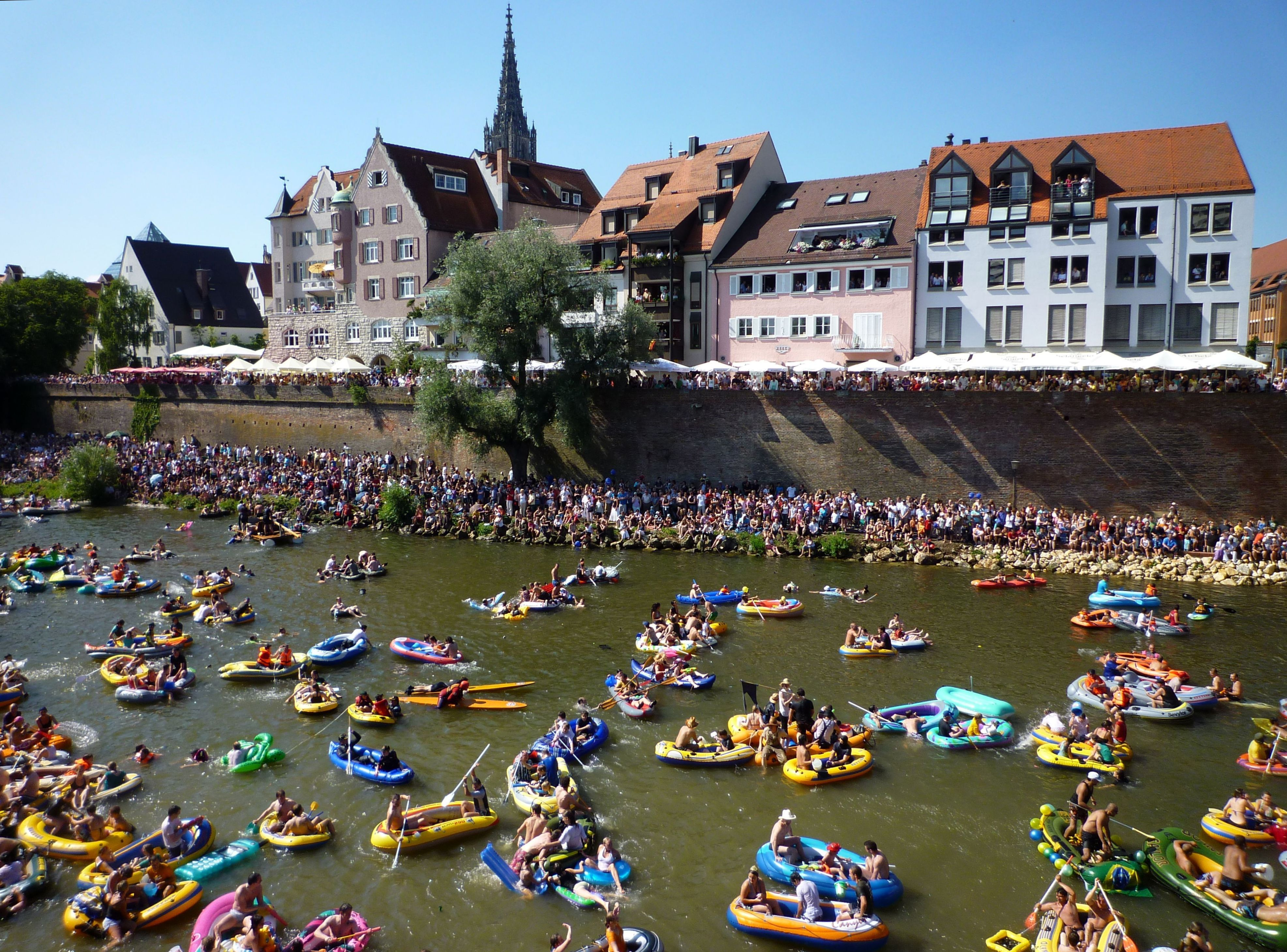 Ulm - Schwörmontagsfestzug -Nabada- auf der Donau_06